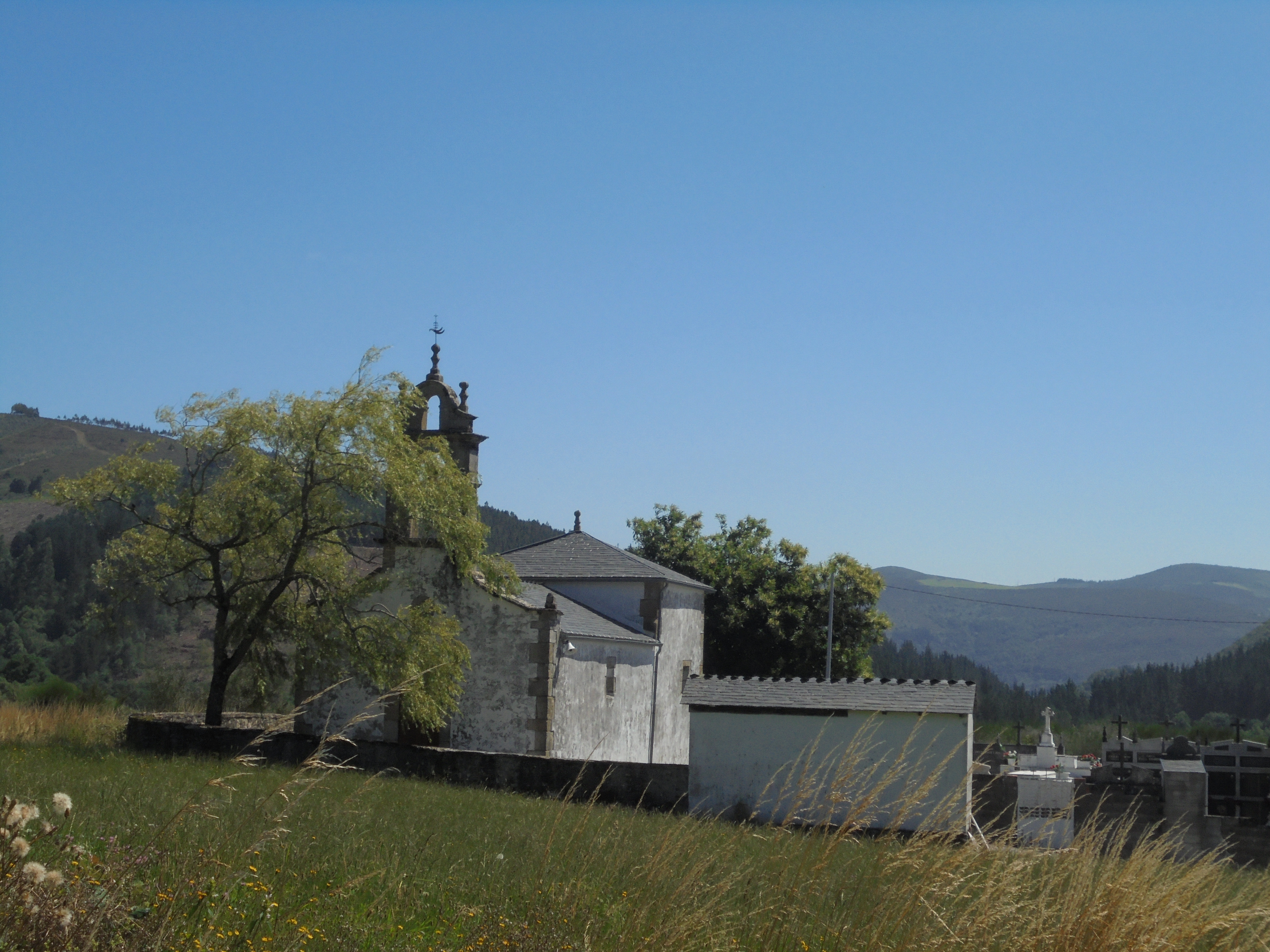 Igrexa parroquial de Fonteo ( Baleira)